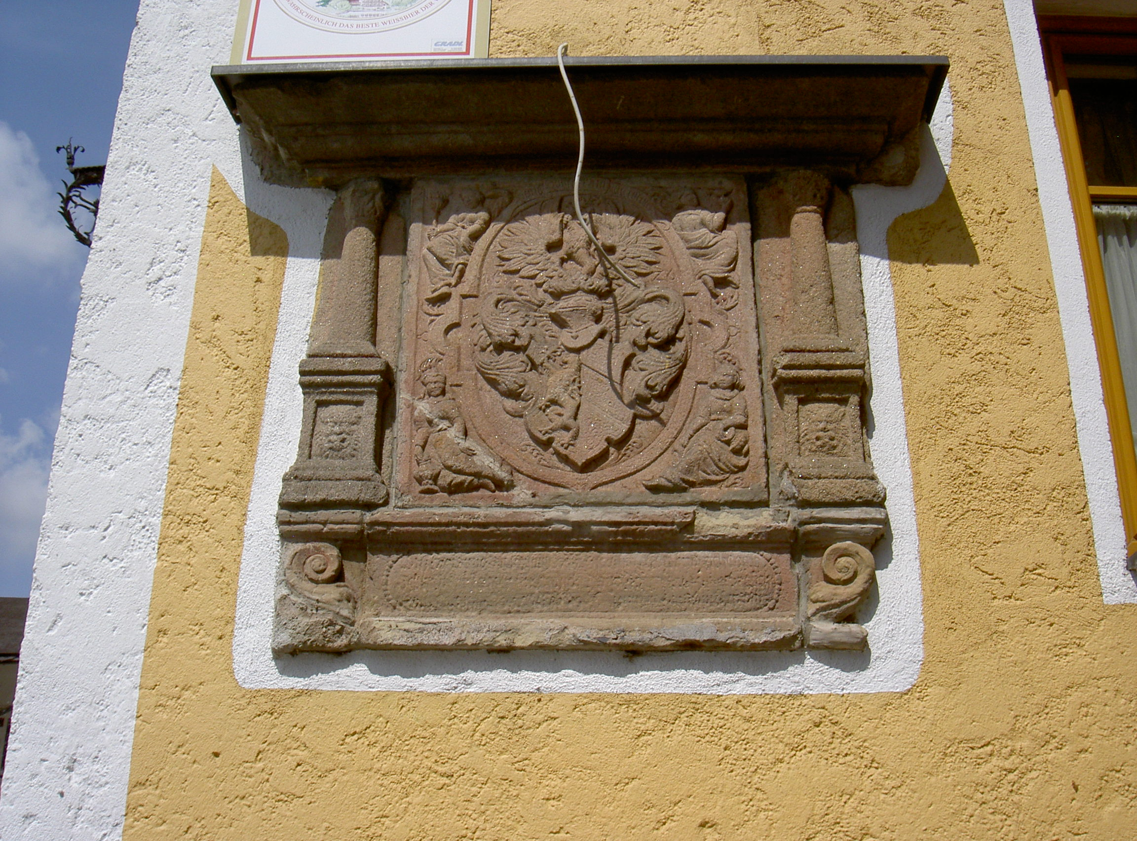 Altenstadt Wappentafel an der Waldthurner Straße